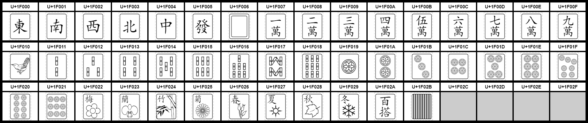 Grafiktafel für den Unicodeblock Mahjonggsteine. Schraffierte Felder sind unbesetzte Codepoints.